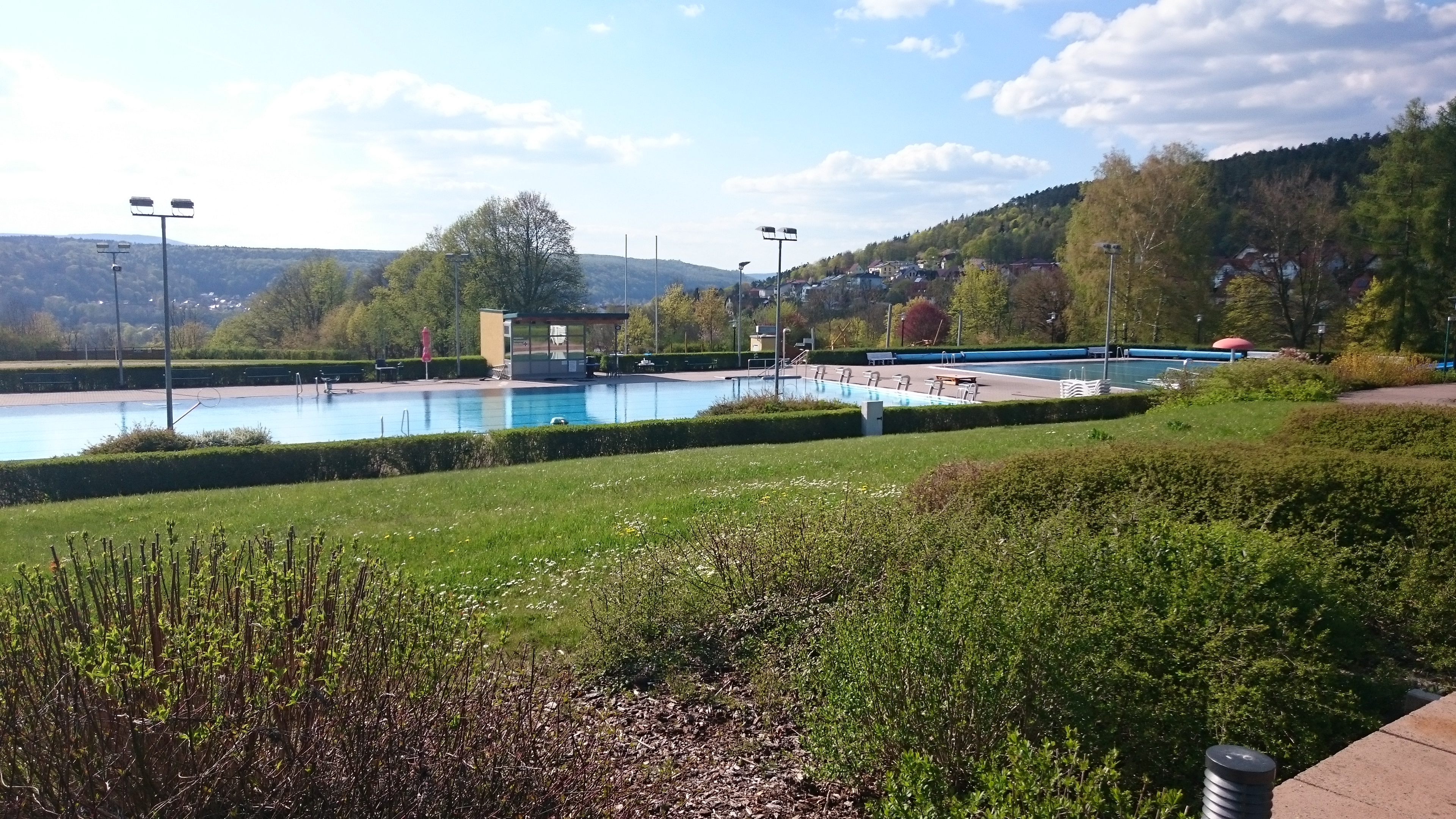 Freibad im Freizeitzentrum „Rohrer Stirn“ in Meiningen mit Wettkampfbecken, Nichtschwimmer- und Babybecken und Wasserrutsche.